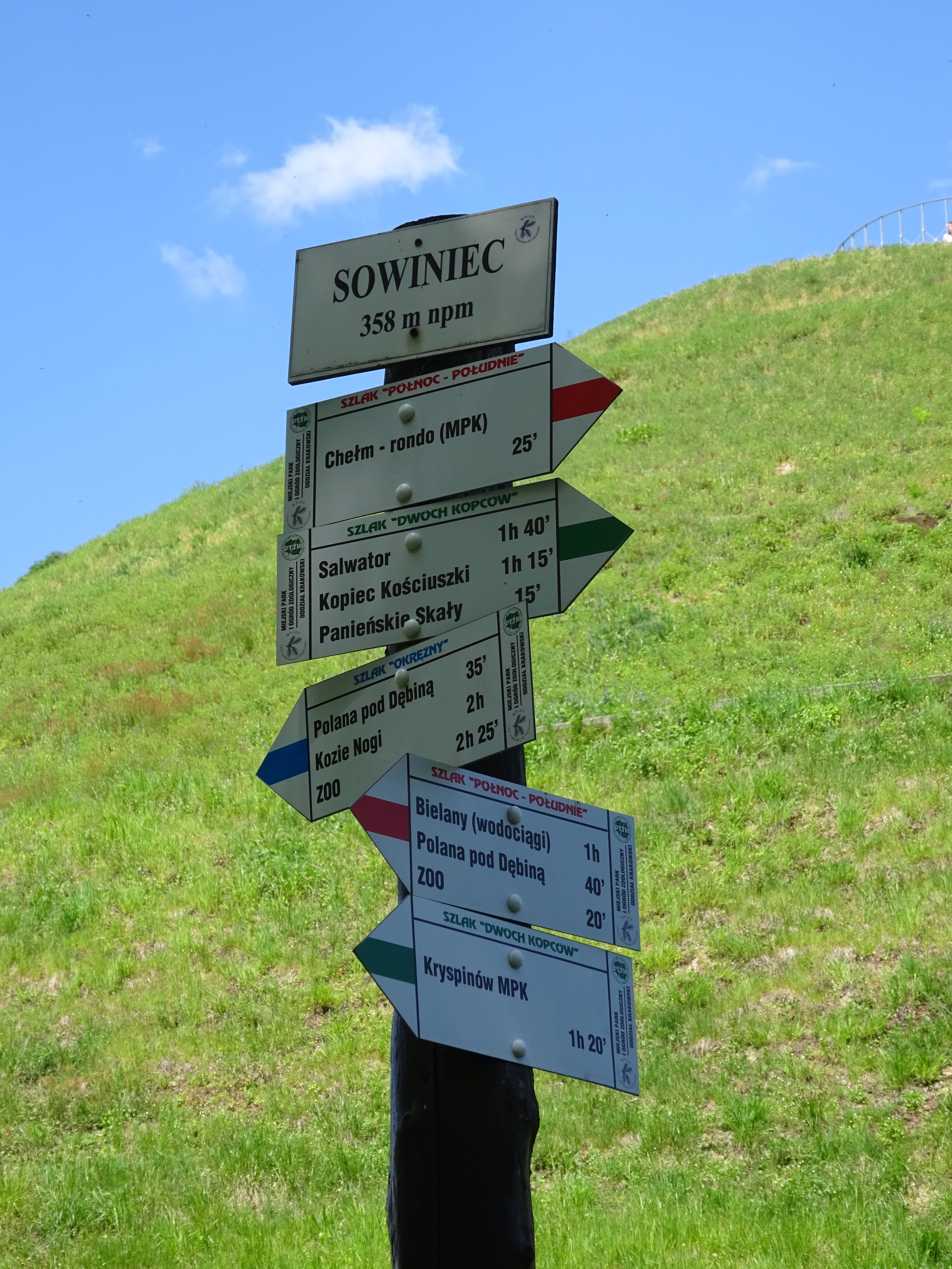 Tabliczka z informacjami na szczycie Sowińca w Lesie Wolskim, koło Kopca Piłsudskiego w Krakowie.